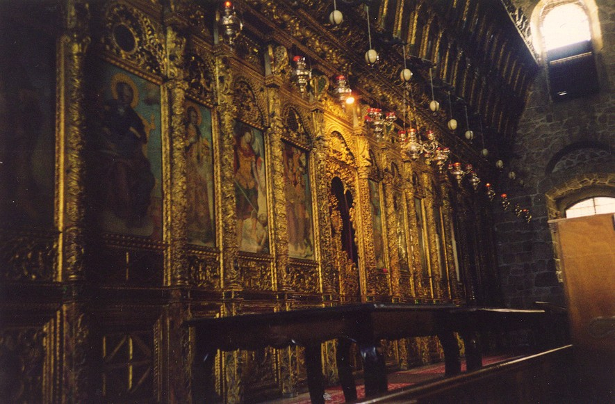 Iglesia de San Lázaro. Larnaca. Chipre Interior Imagen tomada por el cargador. Año 1998.